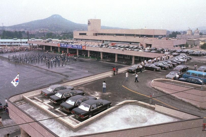 서울 상봉시외버스터미널이 준공